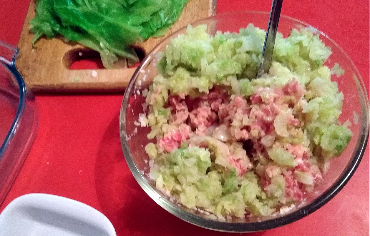 Preparazione del ripieno per i caponet